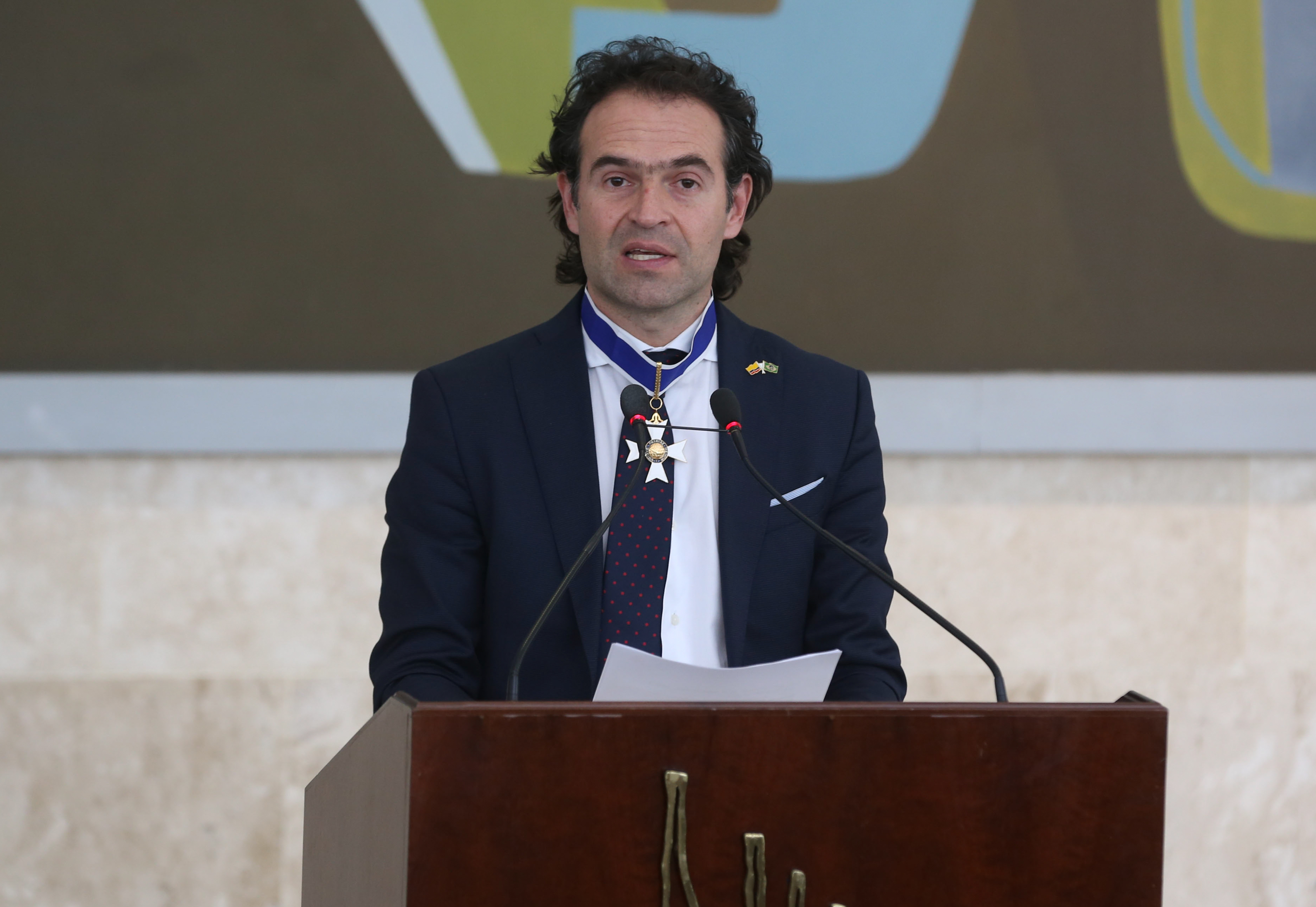 Brasília - O prefeito de Medellin, Federico Gutiérrez Zuluaga recebe a Ordem de Rio Branco e a Ordem do Mérito da Defesa (Valter Campanato/Agência Brasil)